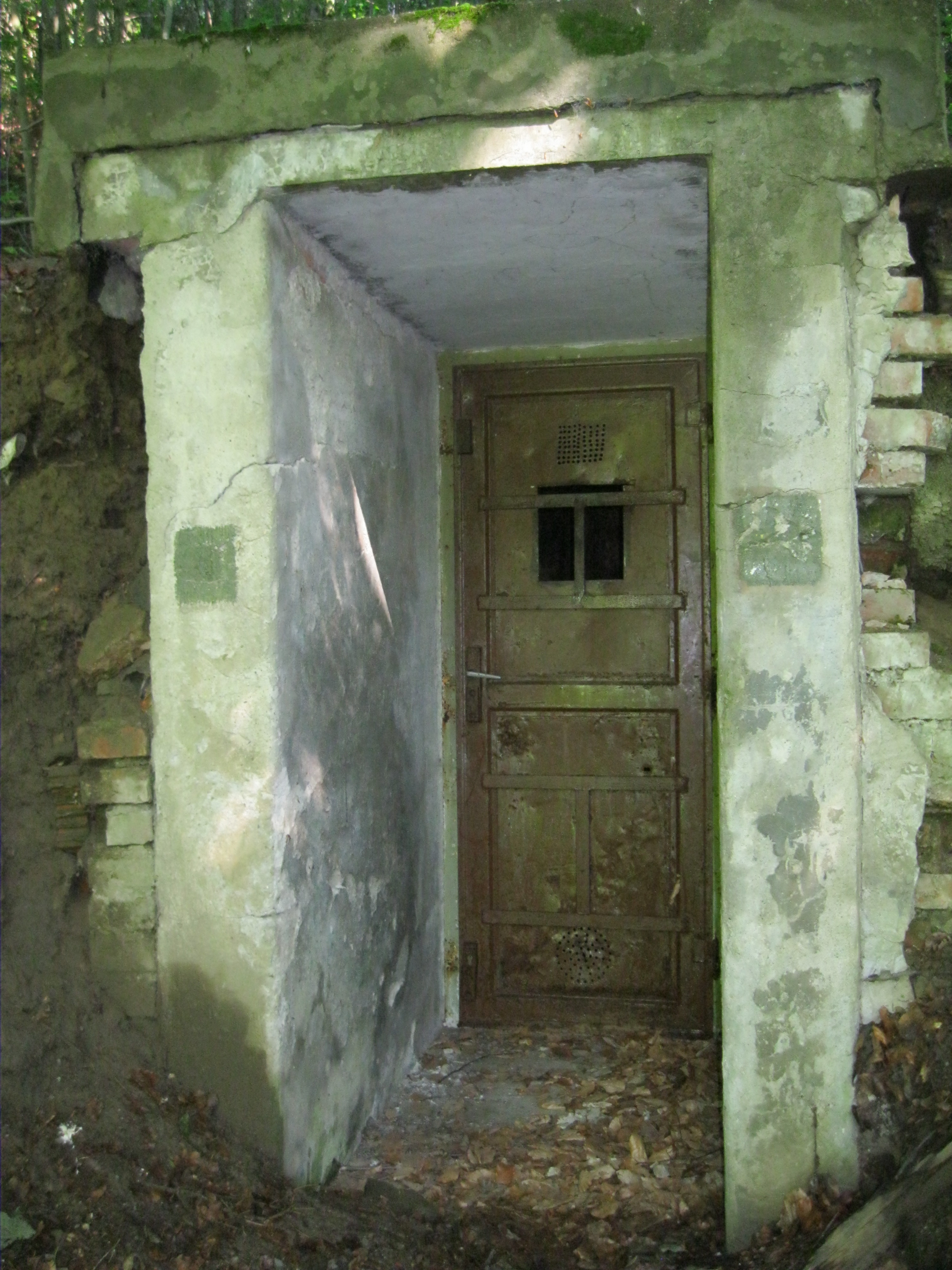 Zemljanka - partyzánské bunkry (Pivonín), les SZ od obce Pivonín, Pivonín